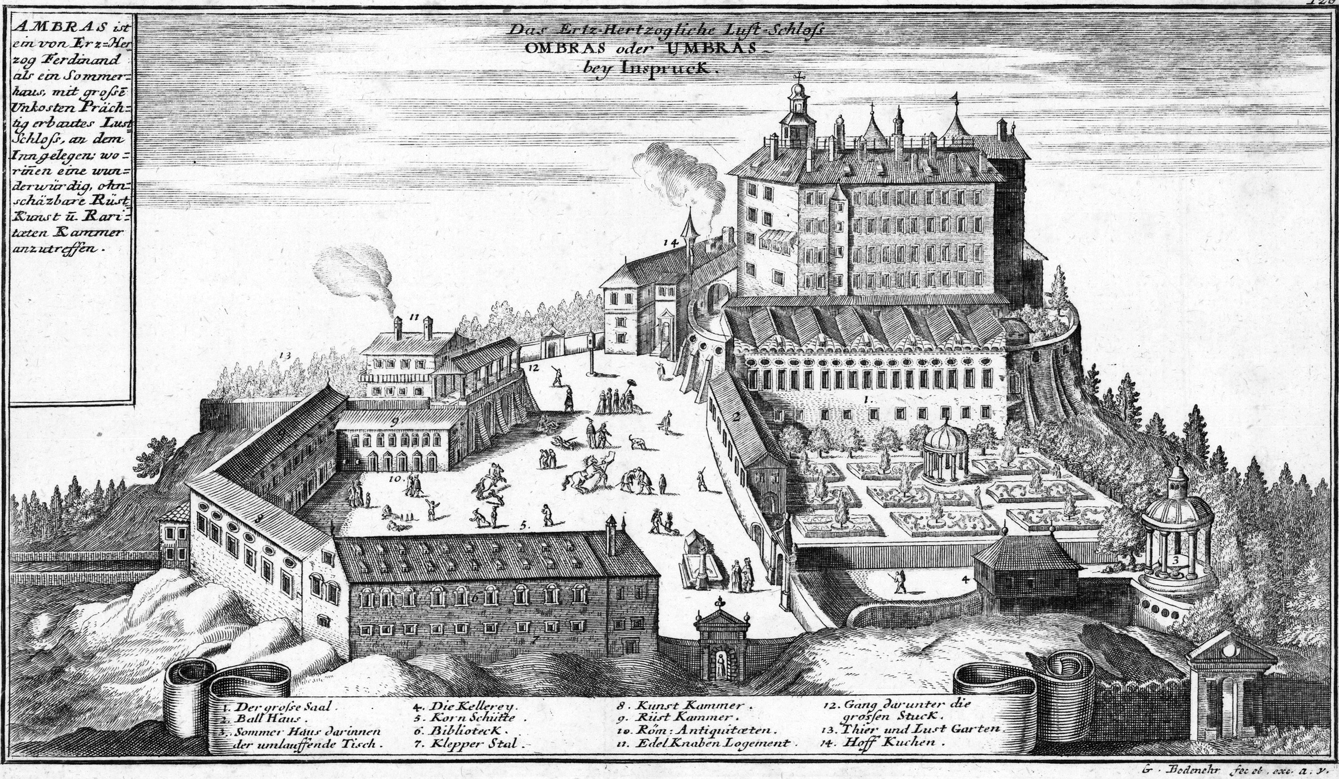 Curioses Staats und Kriegs Theatrum Dermahliger Begebenheiten im Tyrol : durch Unterschiedliche Geographische, Hydrographische, Topographische, Chronologische, Genealogische, Historische &c. Carten, Abrisse, und Tabellen Erlaeutert, Augspurg : Stridbeck, [ca. 1700] Ombras ode Umbras